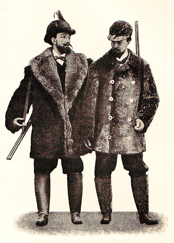 Bildunterschrift: Jagdpaletot aus Ziegen nat., Nat. Griesfuchsbesatz. Jagdpaletot aus nat. Seehund